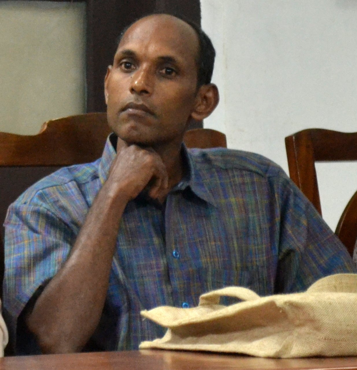 പ്ലാവ് ജയൻ